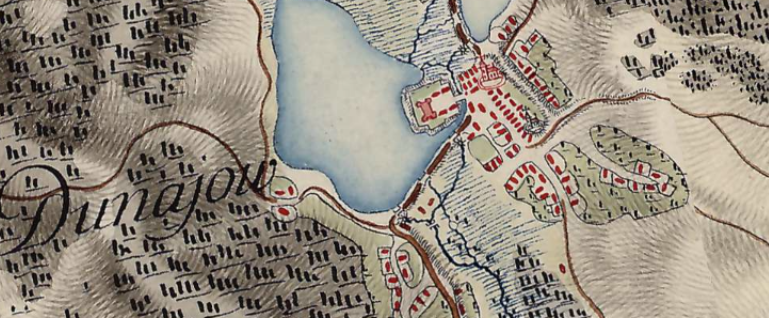 xviii